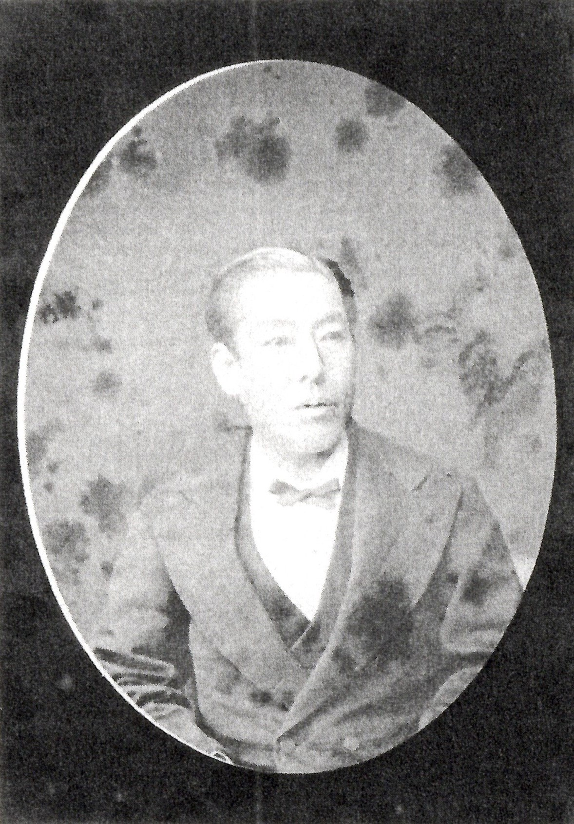 木下利恭の肖像写真。